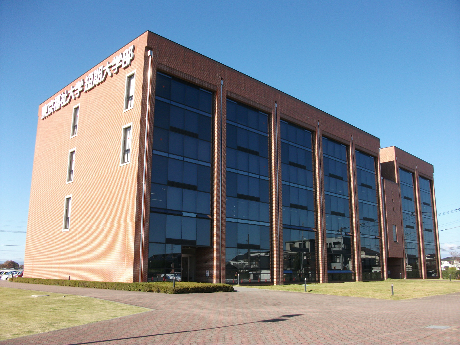 東京福祉大学 伊勢崎キャンパス短期大学部棟